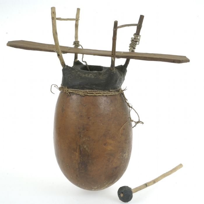 Op een grote kalebas is een frame van 4 stokjes geplaatst met behulp van hars. Tussen deze stokjes is met reepjes duikerhuid een klankstaaf (lamel) gehangen, waarop met een slaghout geslagen wordt.